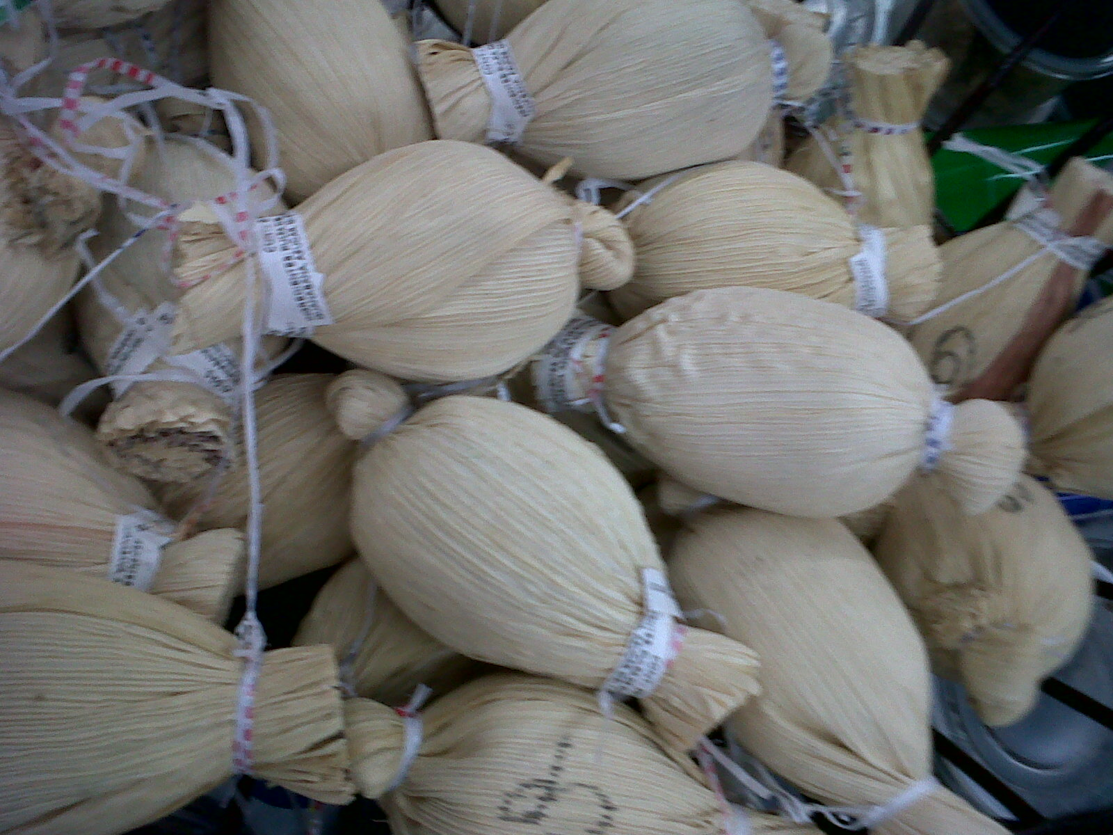 Dulces de camote con piña embueltos en joloche. Dulces típicos del municipio de Jalapa, Tabasco, México.